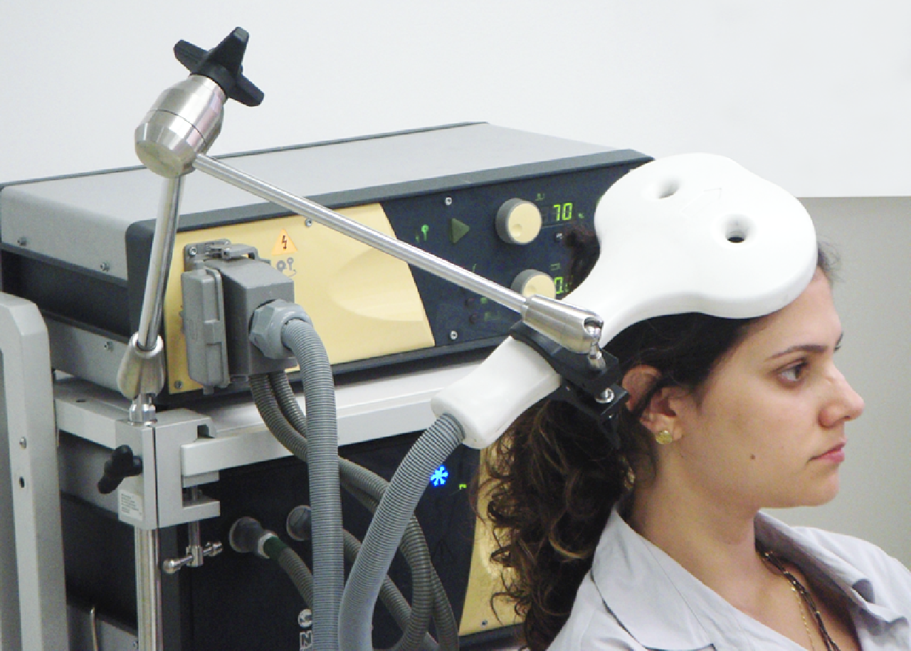 ТМС установка